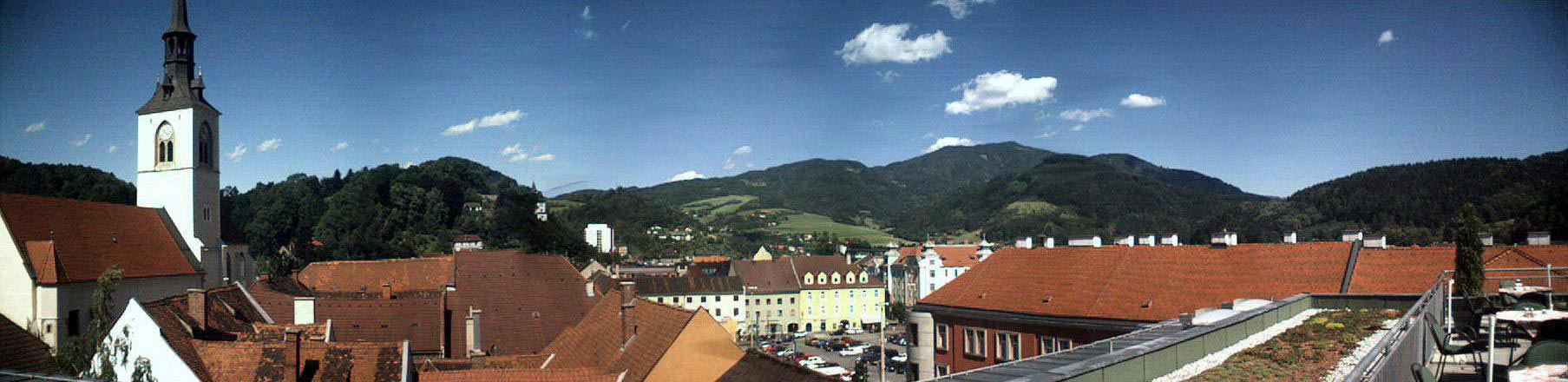 Panorama der Stadt Bruck an der Mur vom Dachgeschoss des Möbelhauses Leiner.